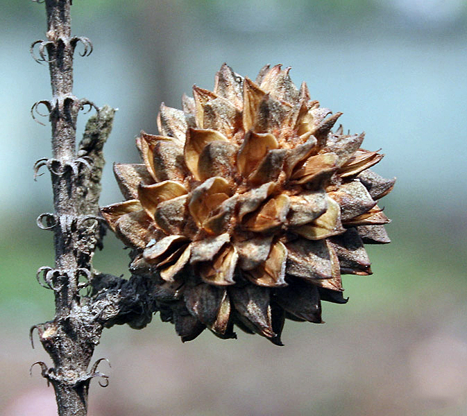 Casuarina equisetifolia in Kolkata, West Bengal, India.